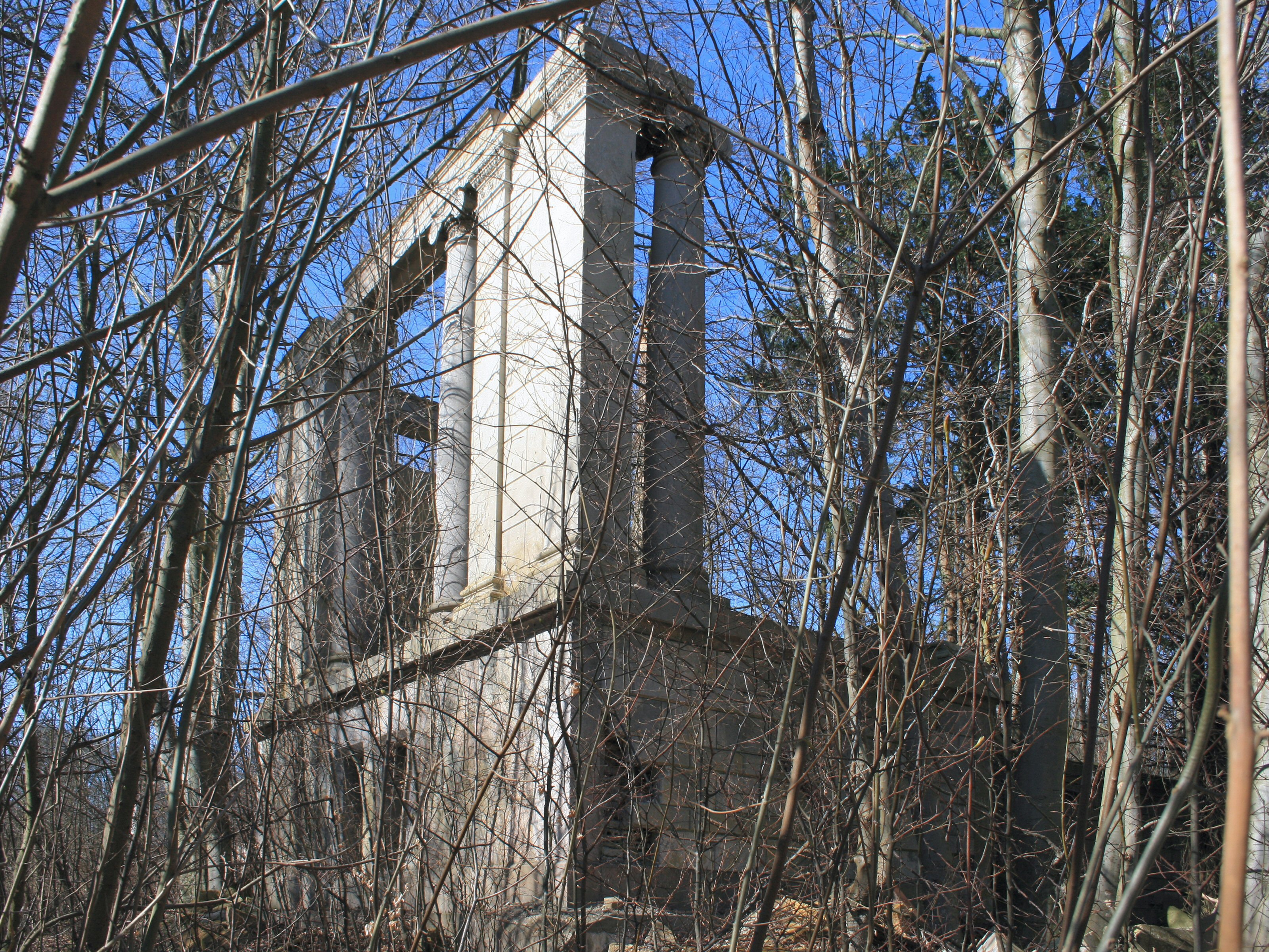 Schlossruine Dwasieden bei Sassnitz auf Rügen – südlicher Pavillon